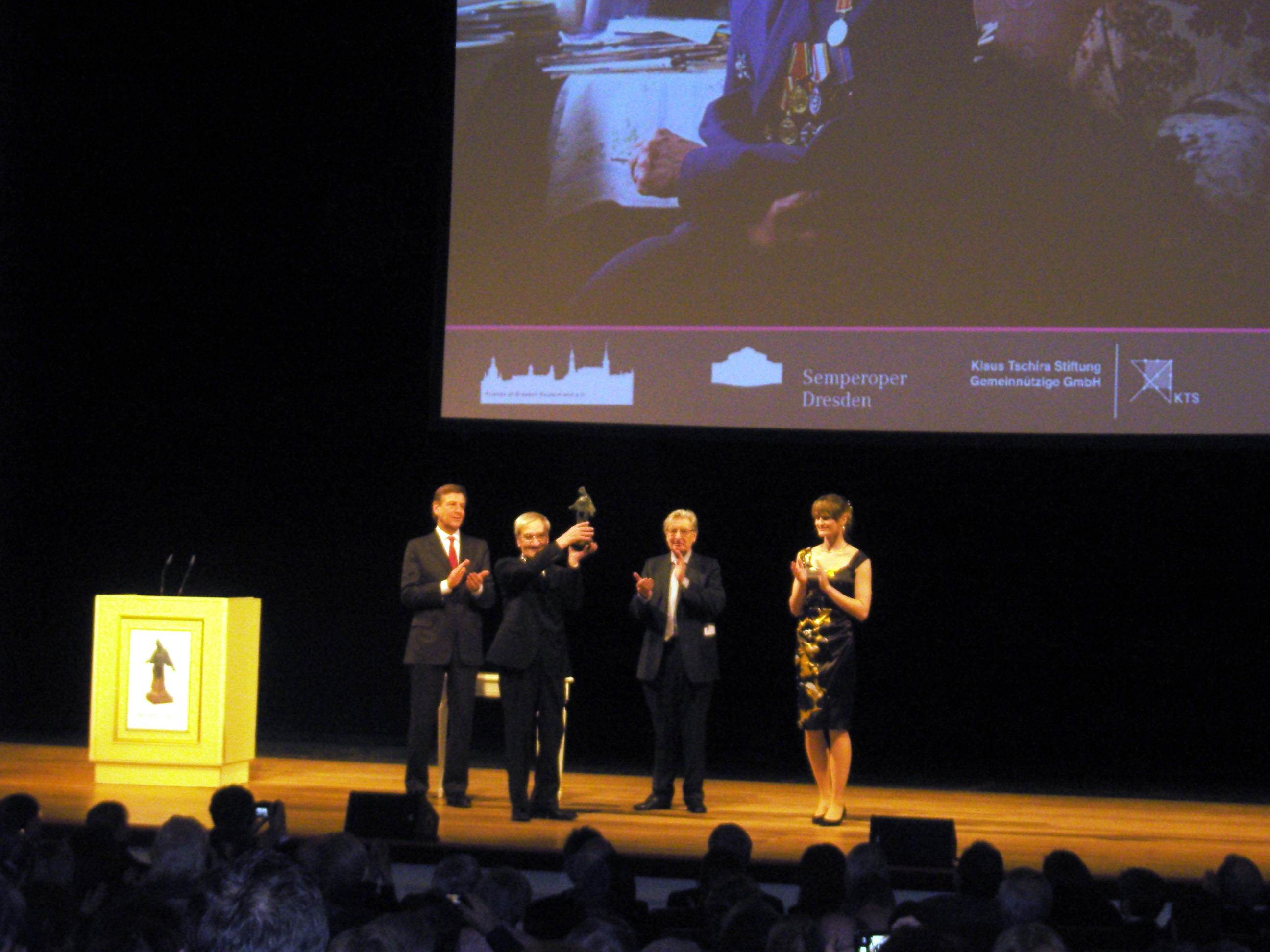 Stanislaw Jewgrafowitsch Petrow bei der Verleihung des Dresden-Preis in der Semperoper; Februar 2013